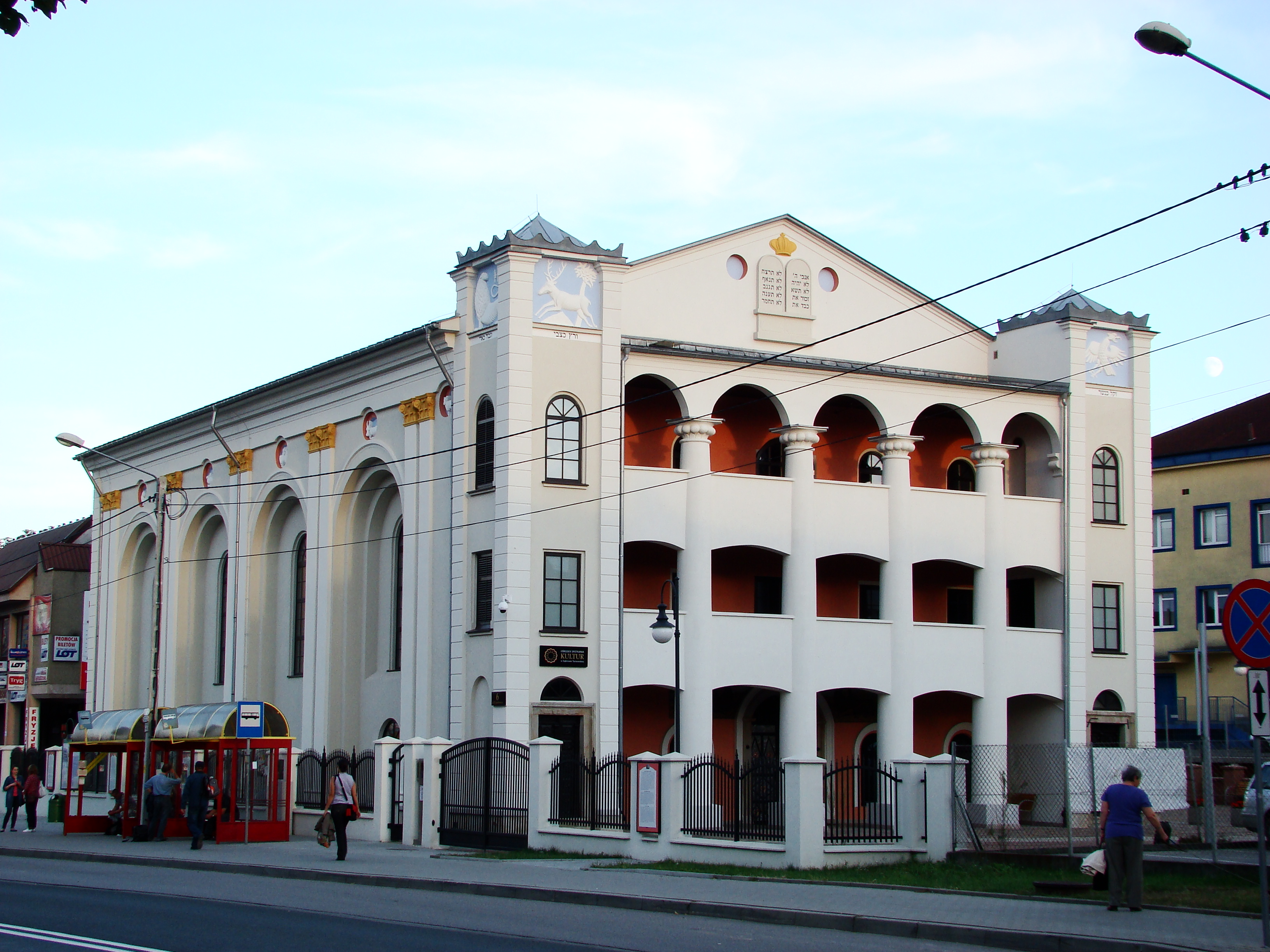 synagoga, 2 poł. XIX.W latach 2010-2012 przeprowadzono kompleksowe prace konserwatorsko-remontowe. Obecnie obiekt pełni funkcję siedziby Ośrodka Spotkania Kultur. ul. Berka Joselewicza 8 33-200 Dąbrowa Tarnowska, Dąbrowa Tarnowska 05.1989.